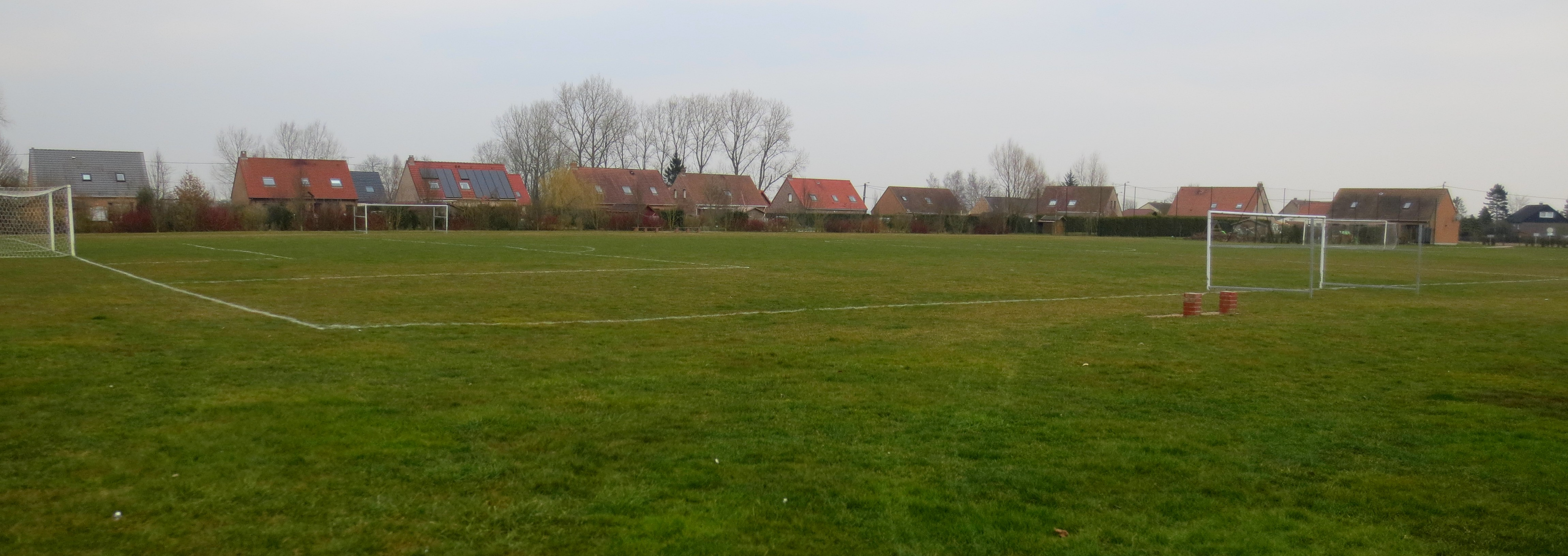 Le terrain de Calonne-sur-la-Lys.